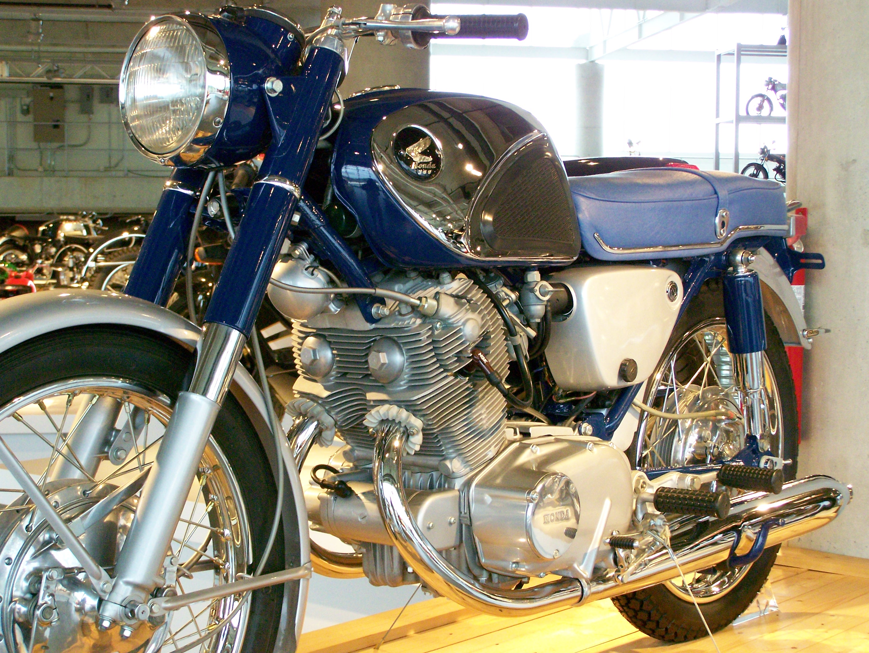 Barber Vintage Museum_159 Honda CB77